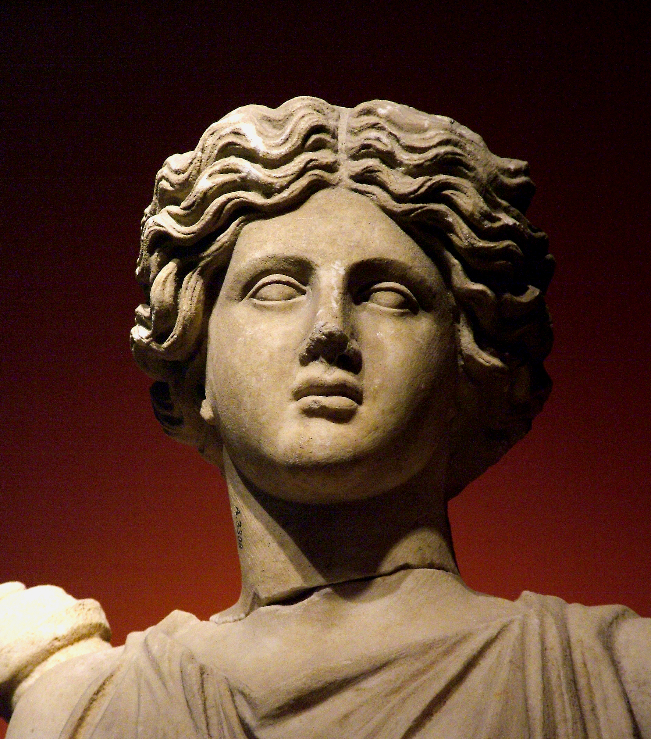 Régészeti Múzeum, Antalya, Törökország: Római kori márványszobor